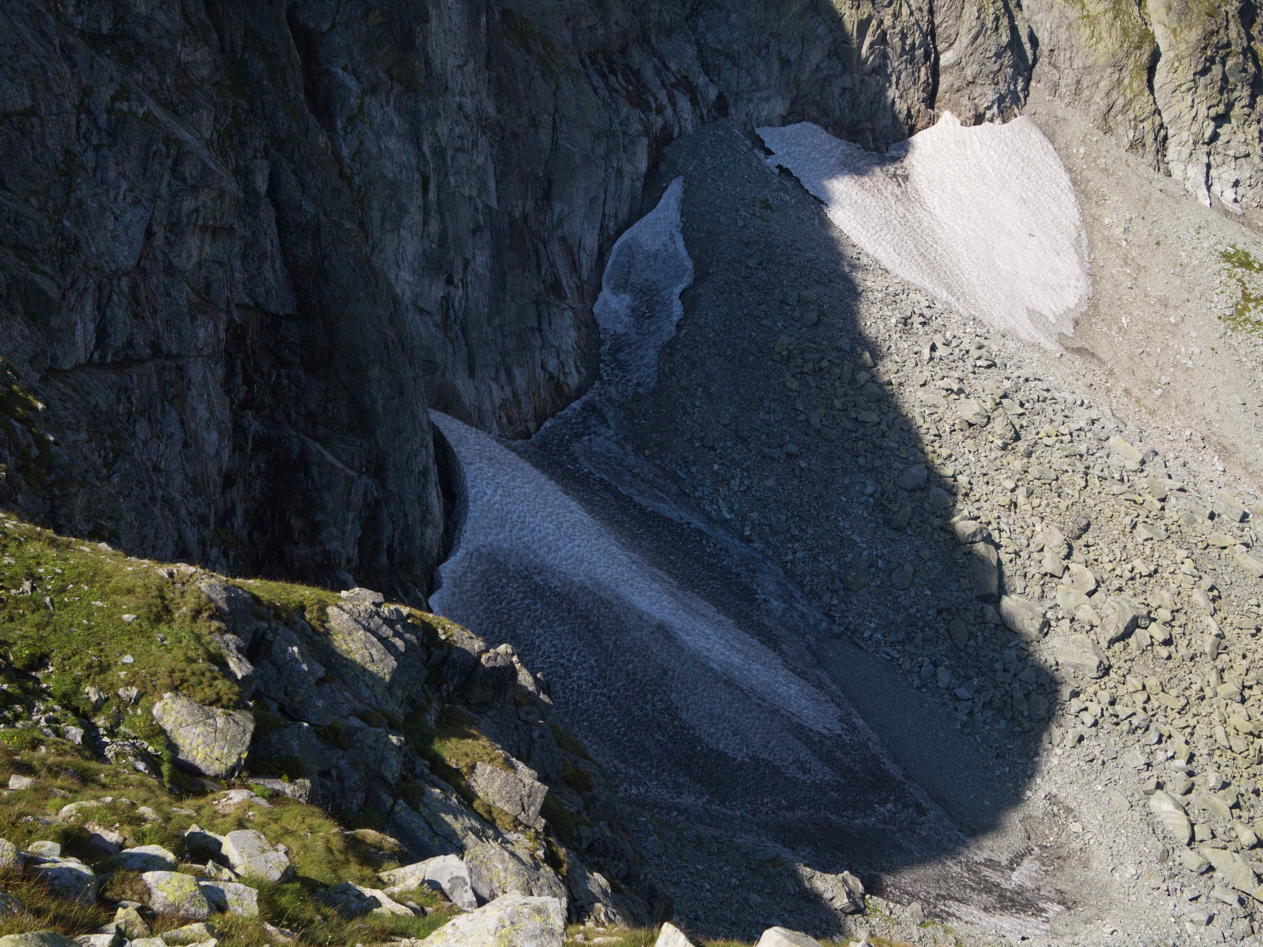 Lodowczyk Mięguszowiecki w Bańdziochu, widok ze szlaku na Kazalnicę.